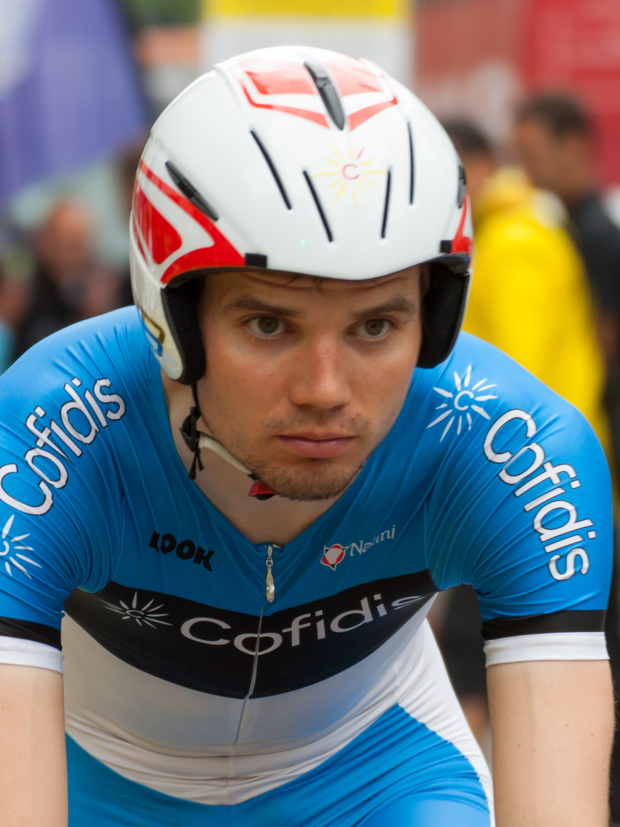 Rein Taaramäe lors du Prologue du Critérium du Dauphiné 2012